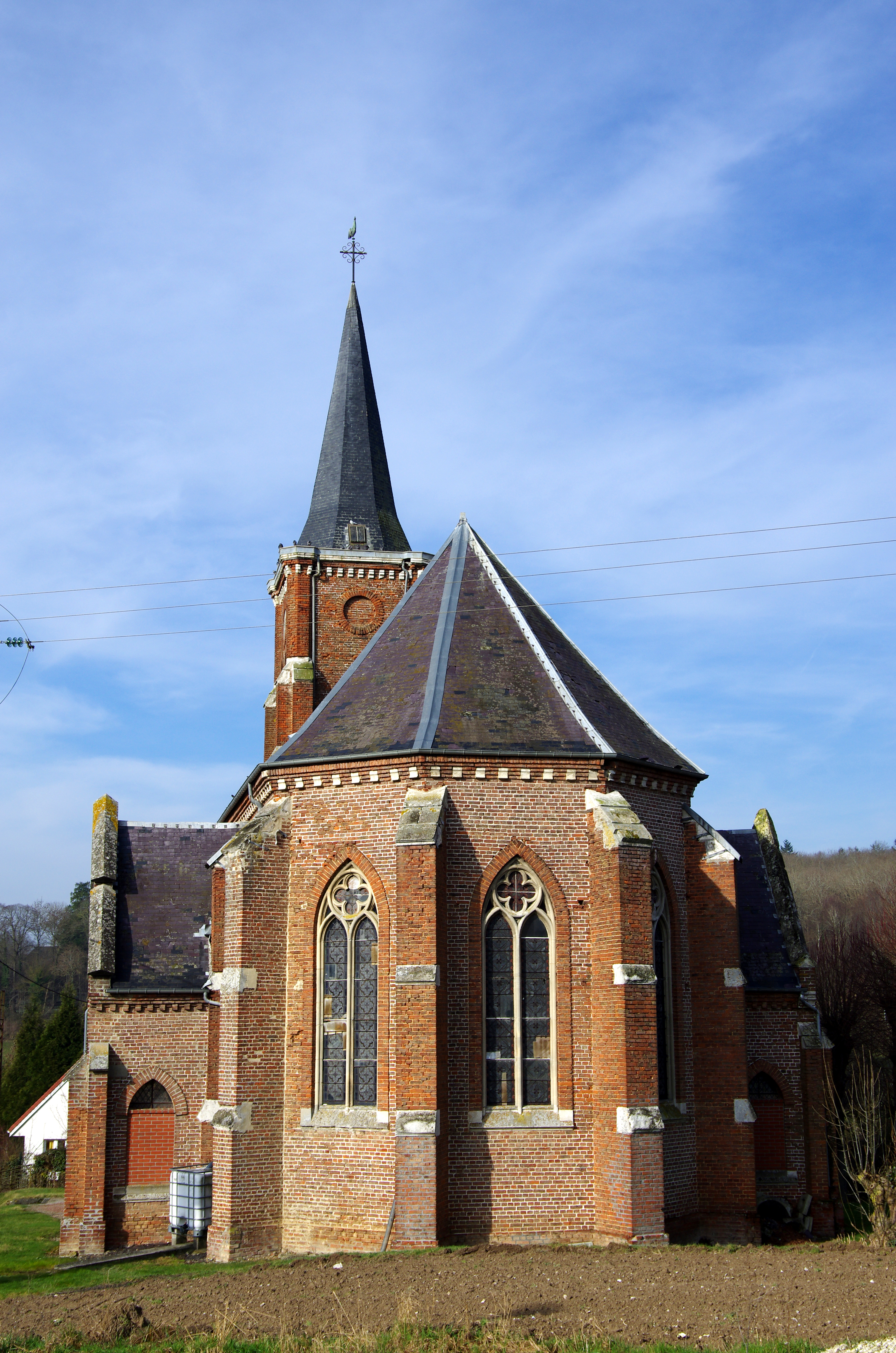 Mouflers (Somme, France) - Le chevet de l'église Saint-Vaast. Le cimetière (invisible ici) est à gauche. On remarque, sur cette face du clocher, l'emplacement circulaire et "vide" d'une horloge. Le cadran a-t-il été jamais posé ? ou a-t-il disparu ? Désolé ! Il est impossible d'échapper à la présence des fils électriques aériens si l'on veut avoir une vue de l'édifice sous cet angle !... .